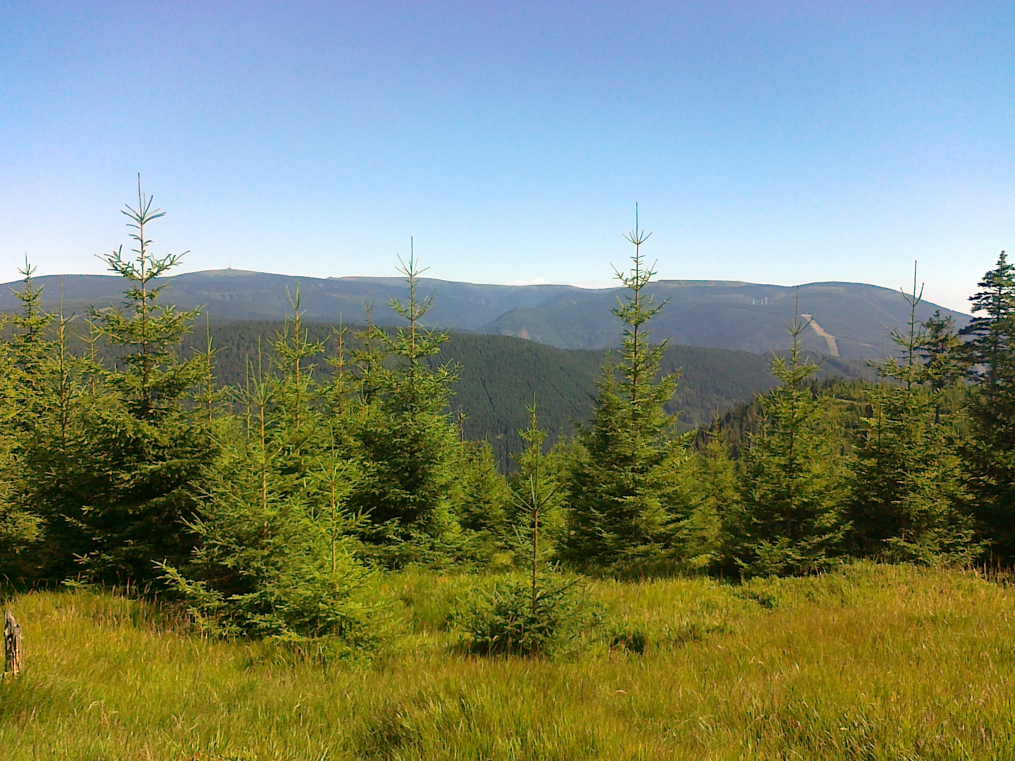 Widok ze stoku góry Spálený vrch - 1313 m n.p.m. w kierunku gór m.in. Pradziad - 1491 m n.p.m. i Dlouhé stráně - 1353 m n.p.m.